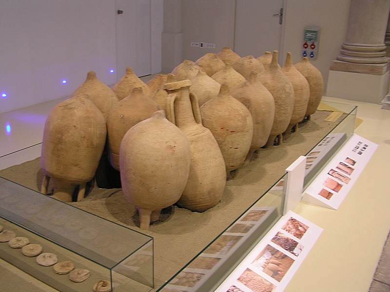 Muzejsko-galerijski prostor Sveta Srca, Pula